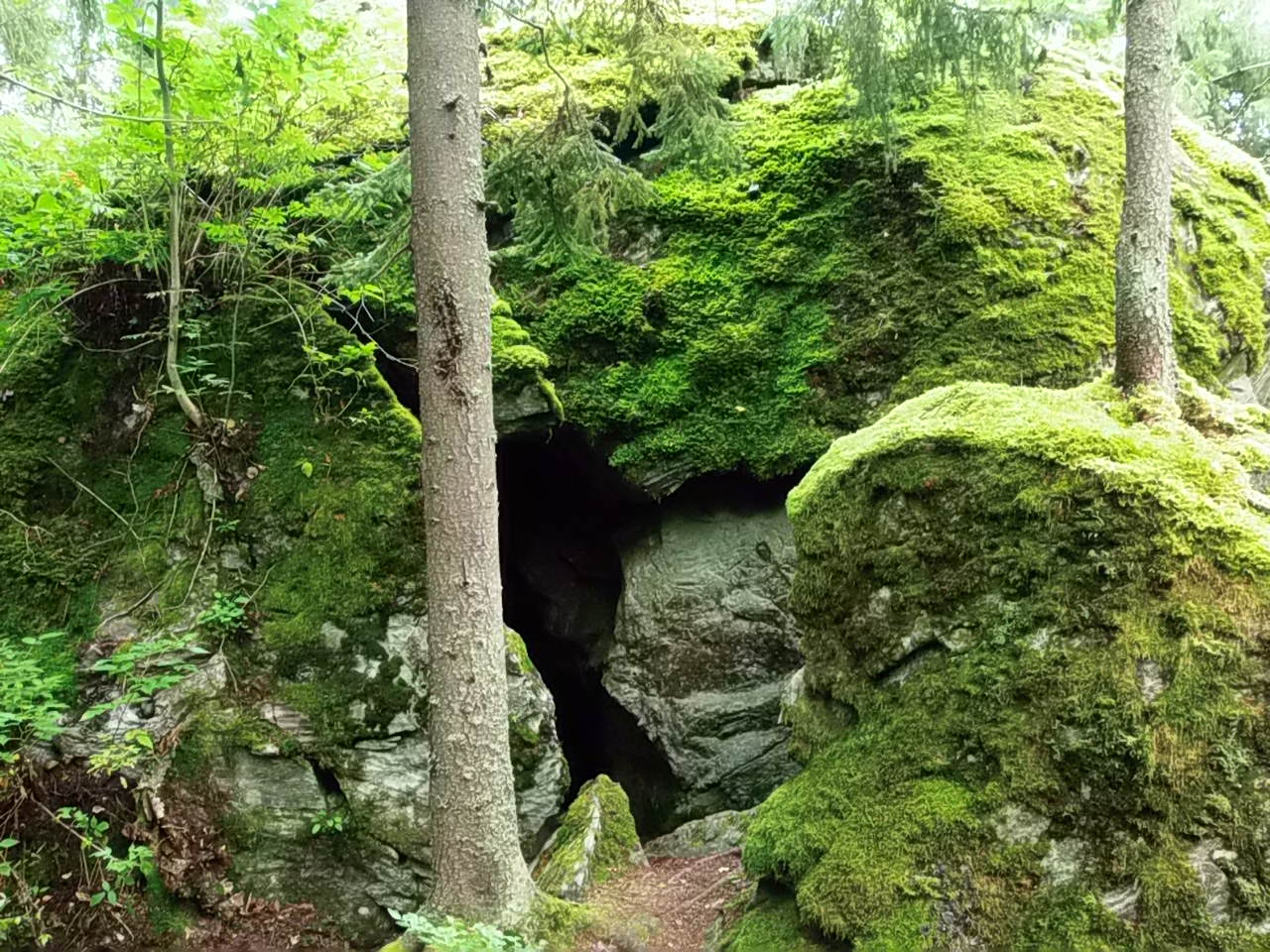 Pilrunkellari Akaan Viialassa.